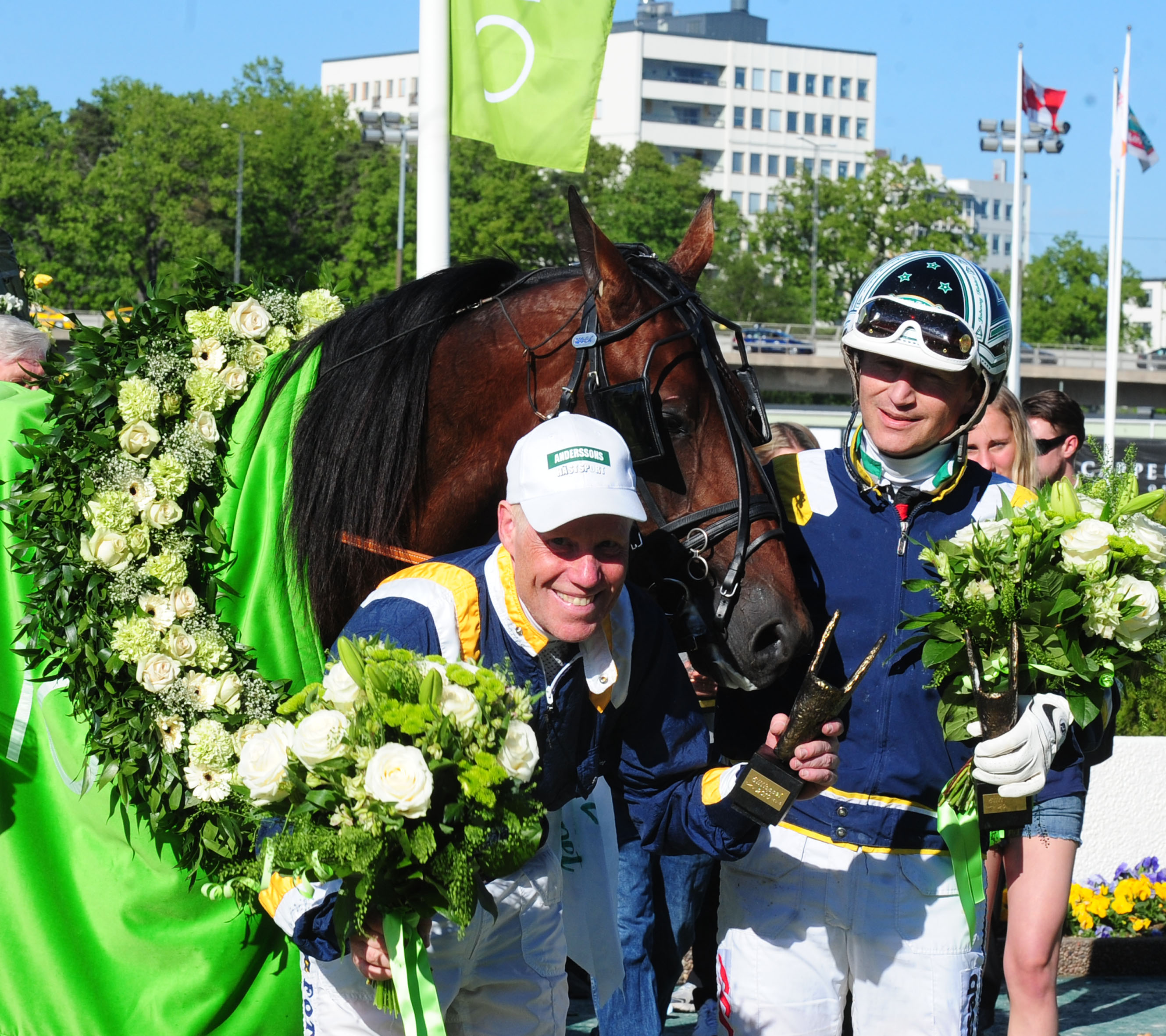 Kusken Johnny Takter (till höger) och tränaren Stefan Melander vinner Elitloppet 2010 med Iceland.